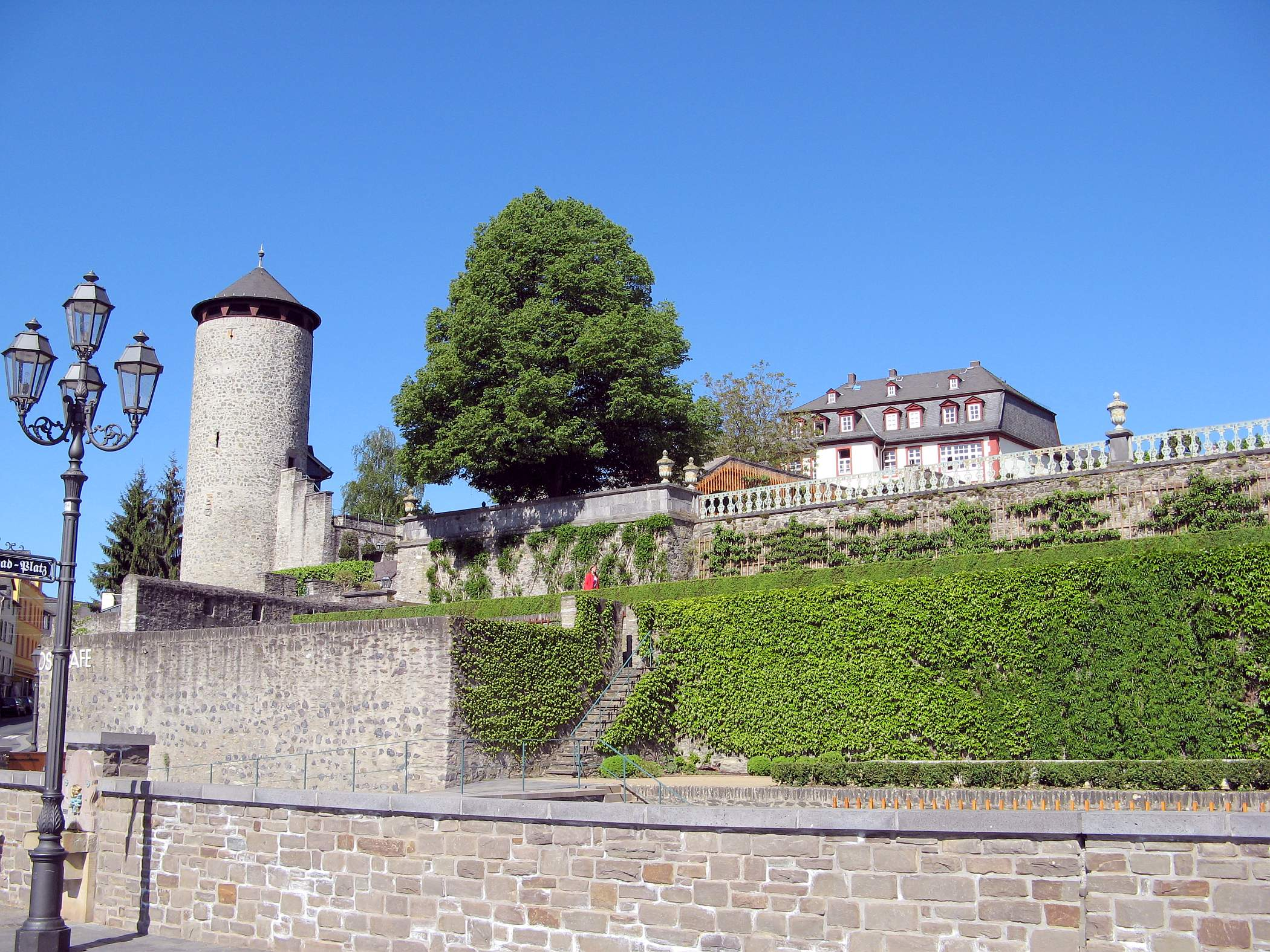 Die Terrassen des Weilburger Schlossparks. In der Bildmitte ist die imposante Kusslinde zu erkennen.